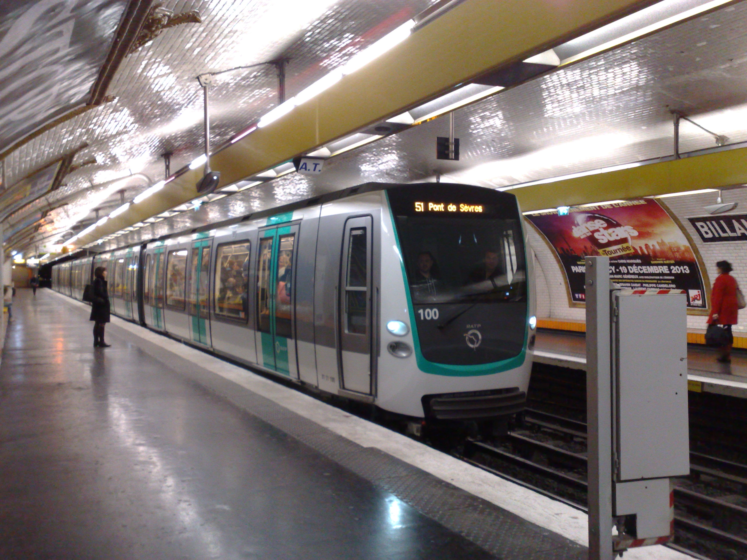 Rame MF01 du métro parisien à la station Billancourt sur la ligne 9, en direction de Pont de Sèvres.